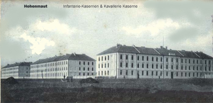 Infanteriekasernen und Kavalleriekaserne in Hohenmaut (Böhmen)